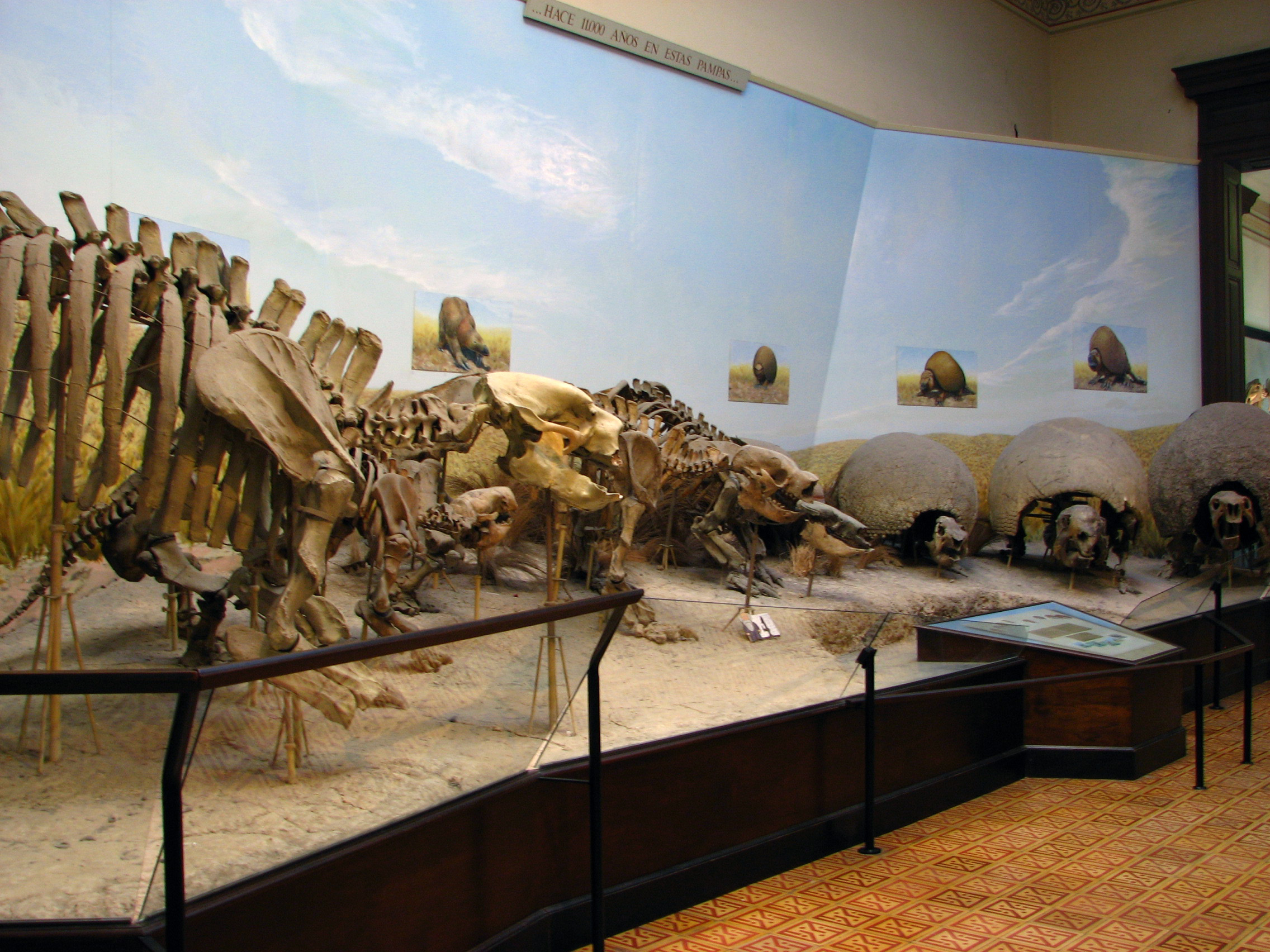 Exposición esqueletos de perezosos gigantes y gliptodontes, en el Museo de la Plata